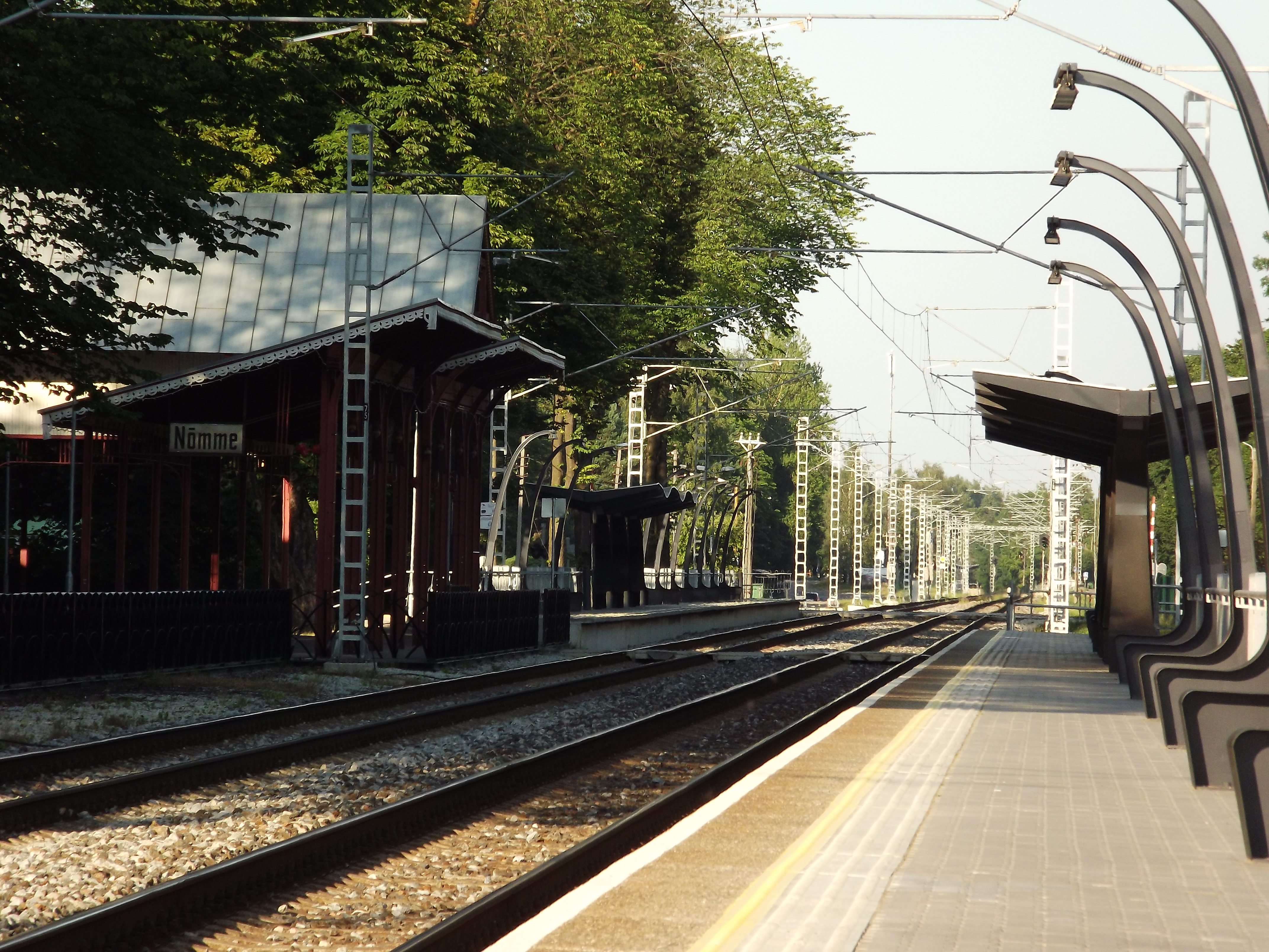 Nõmme raudteepeatus.